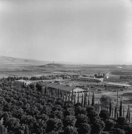 גבת - מראה כללי